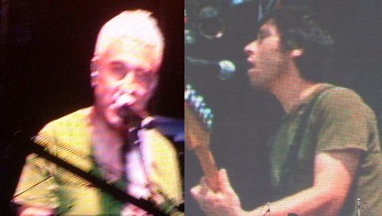 Dos de los tres integrantes originales de Los Prisioneros: Jorge González y Claudio Narea haciendo cada uno por su cuenta su presentación en La Cumbre del Rock Chileno II.